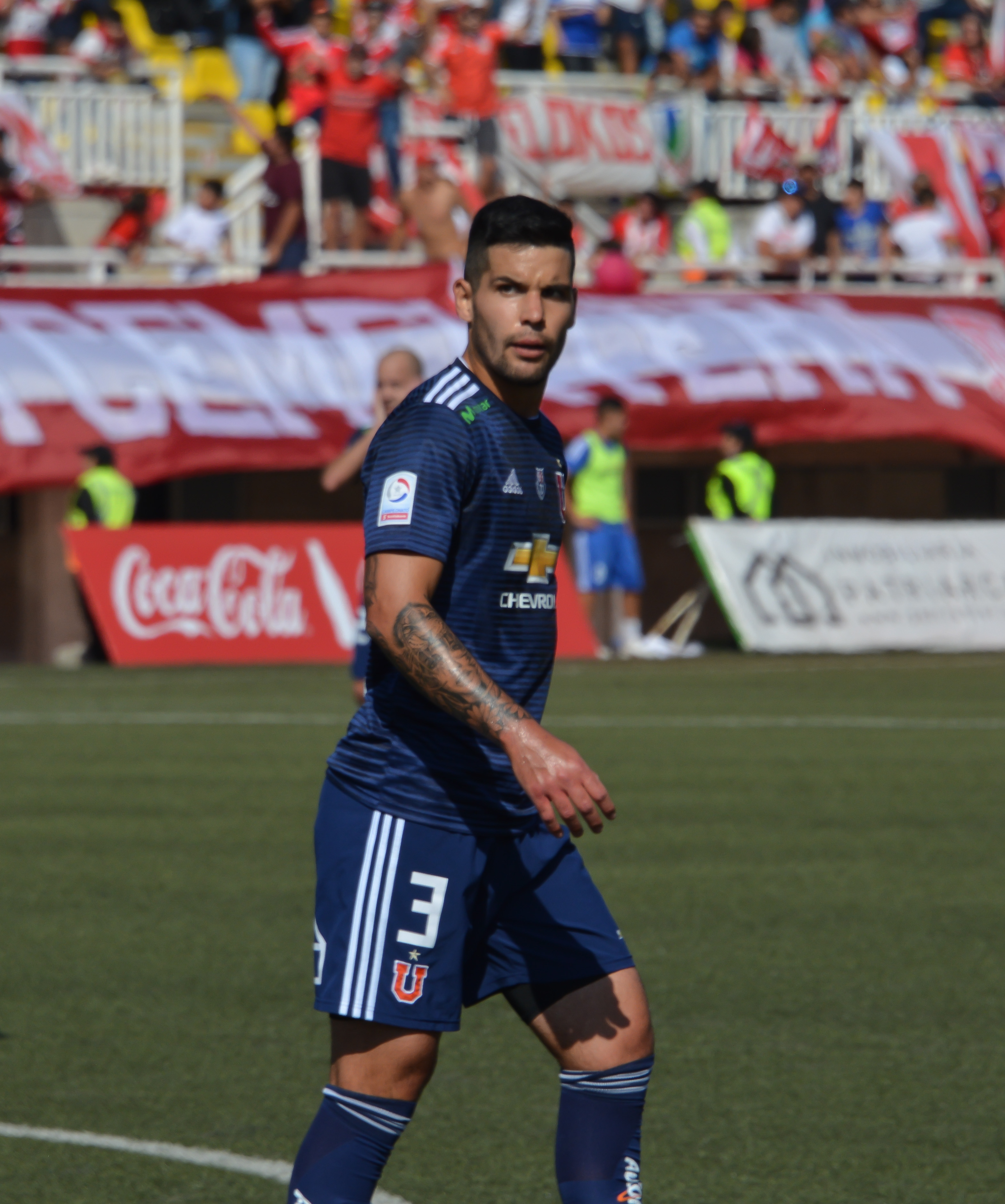 Unión La Calera v Universidad de Chile, Estadio Municipal Lucio Fariña Fernández, Quillota, Chile.